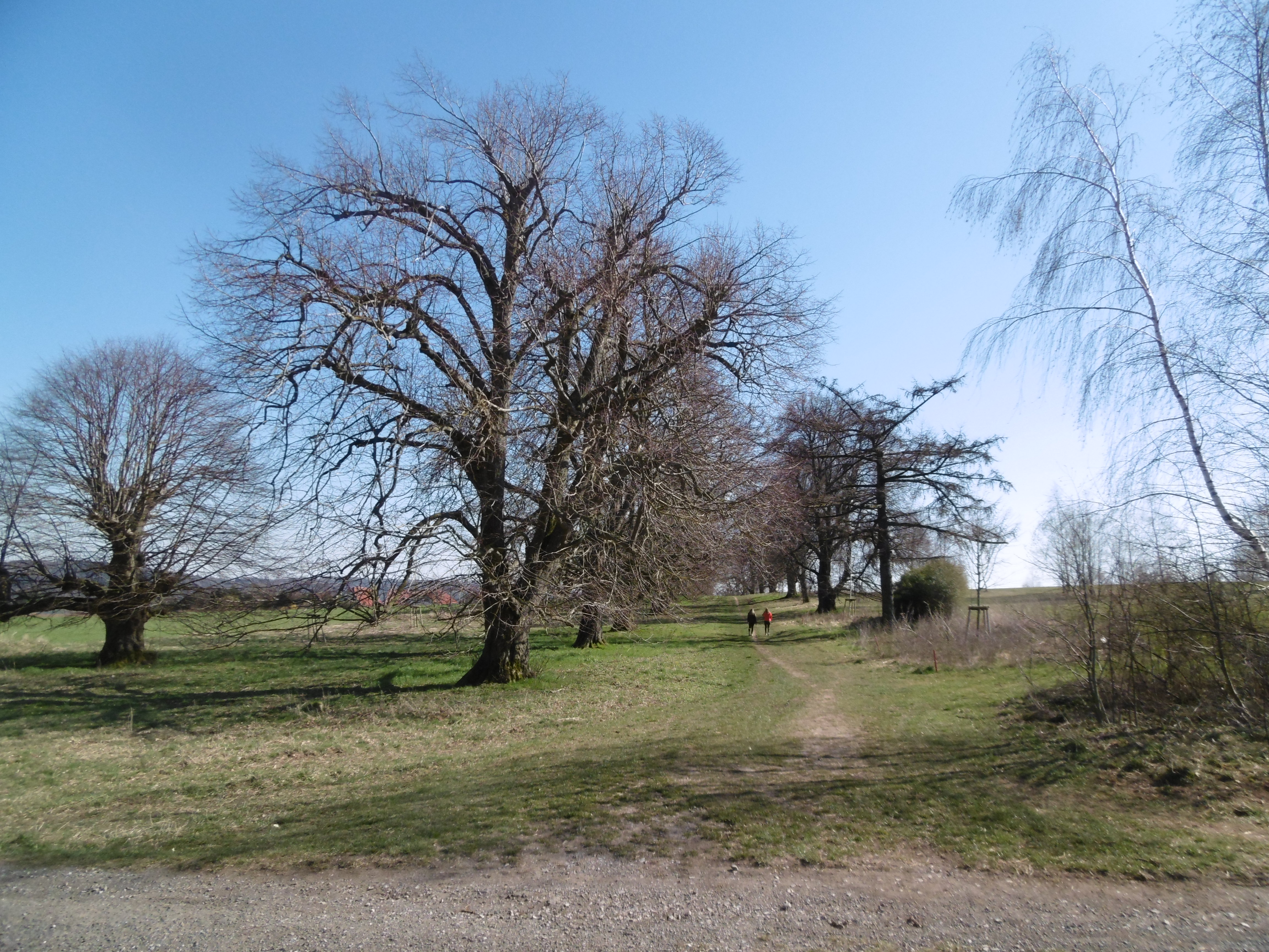 Geschützter Landschaftsbestandteil Doppelallee Westheim vom nördlichen Ende gesehen.